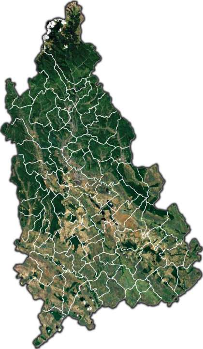 Harta jud Dambovita.